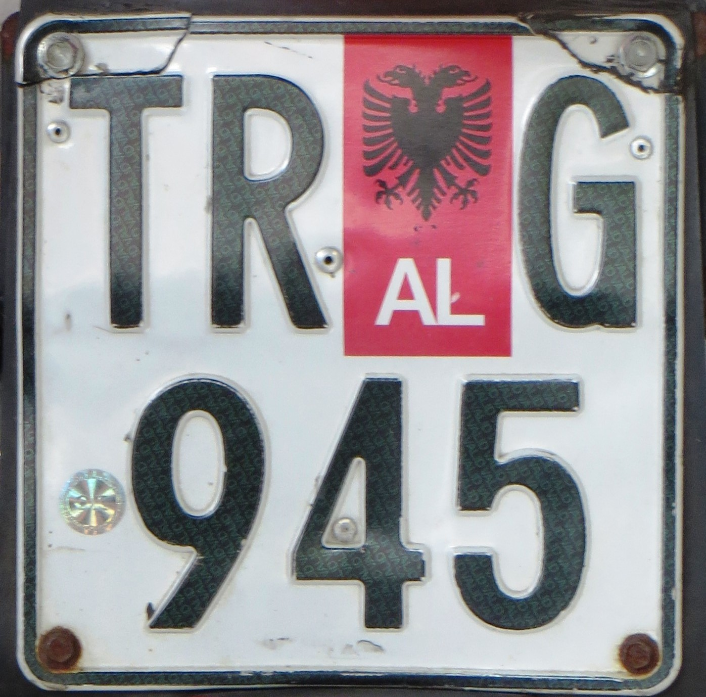 Albanese motorfiets kentekenplaat